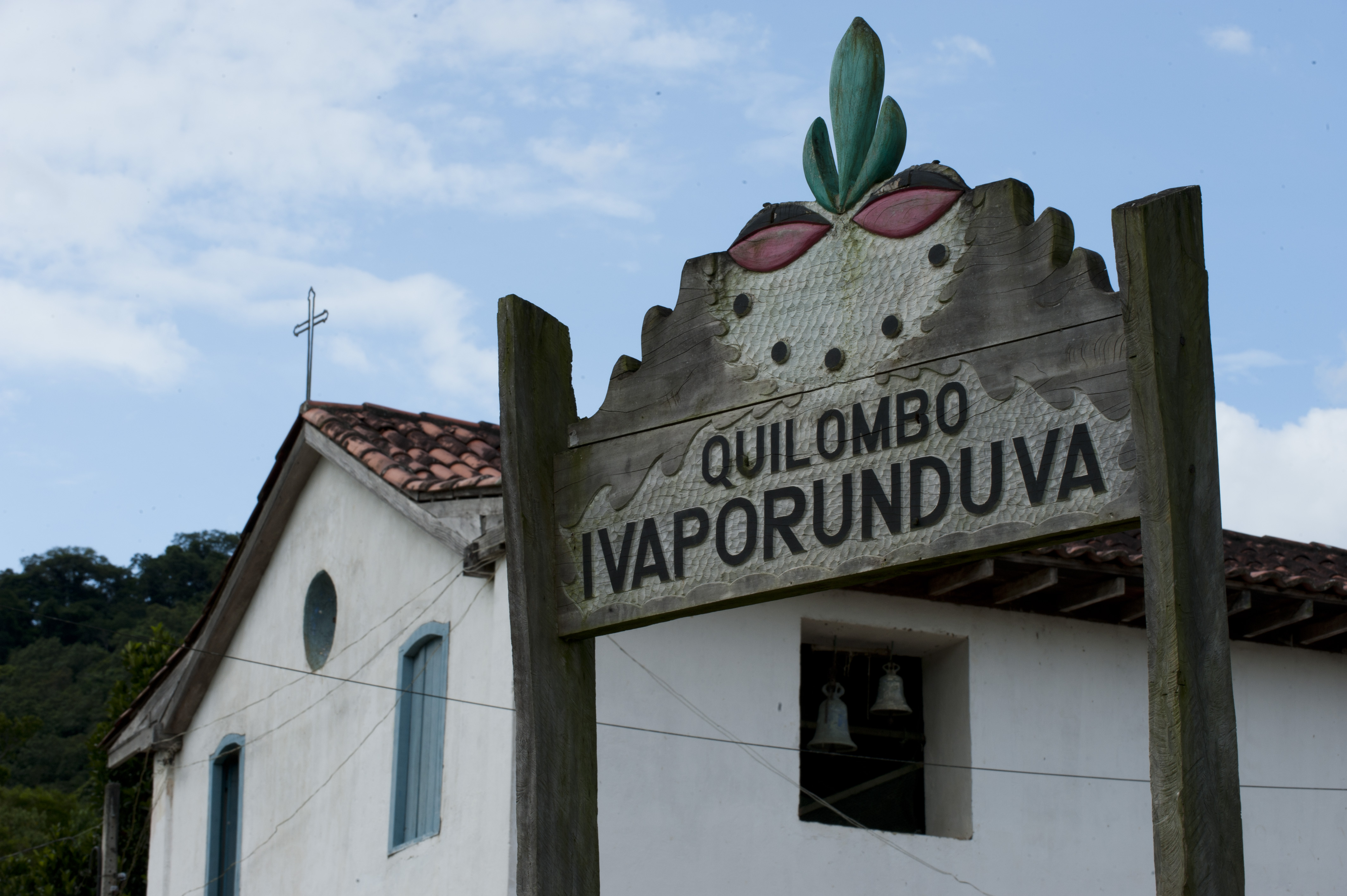 Igreja de Nossa Senhora do Rosário dos Homens Pretos de Ivaporunduva